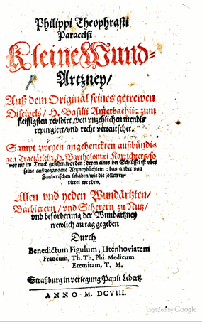 Kleine Wundarzney, published 1608, Paracelsus, Benedictus Figulus (1567-1619)